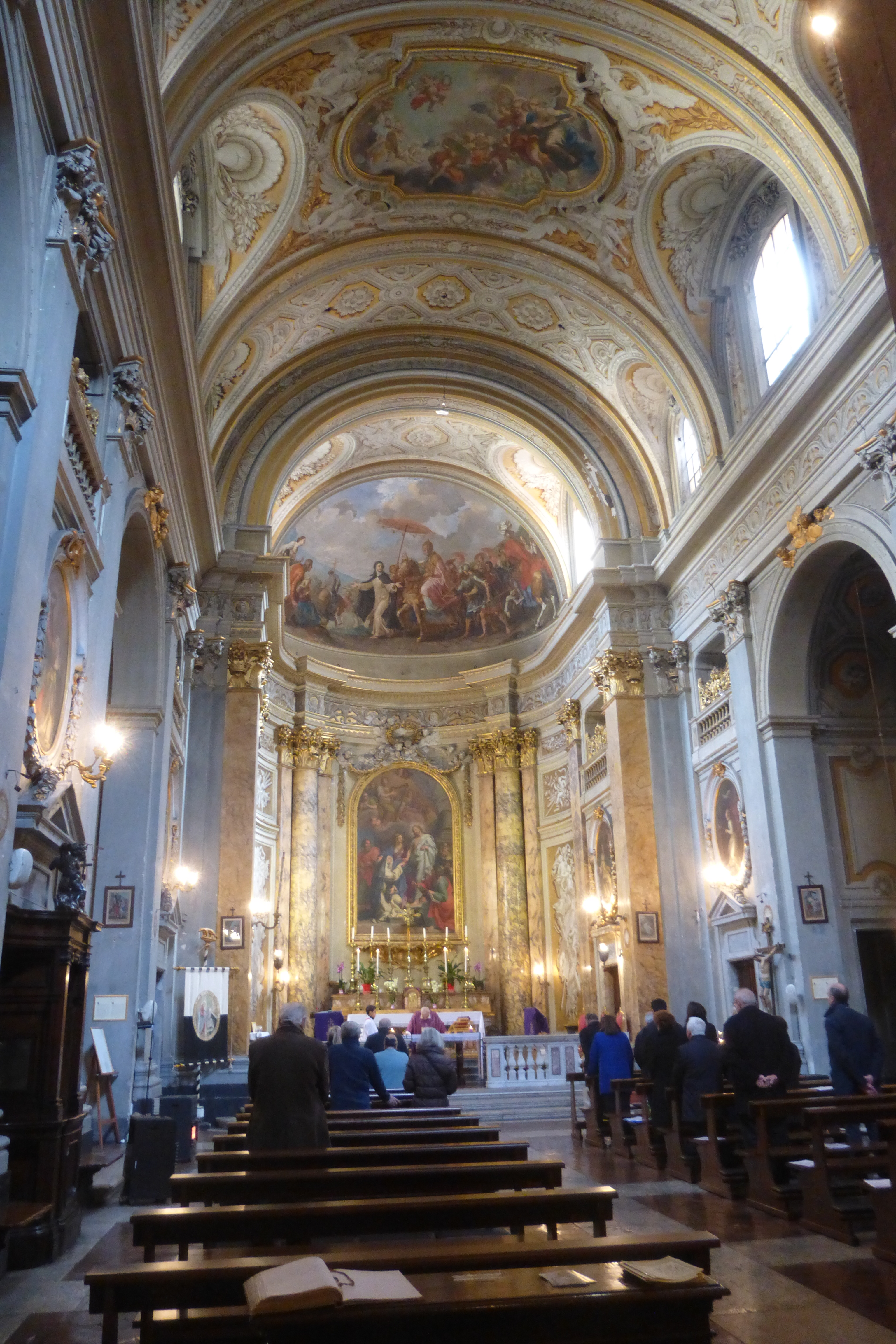 Roma, S. Caterina da Siena a via Giulia, interno.